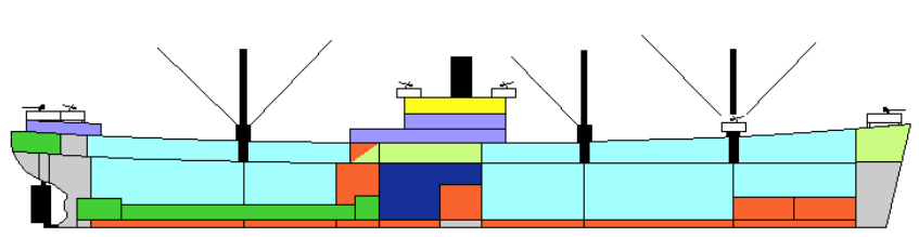 Plan type Liberty ship (Type château au centre)